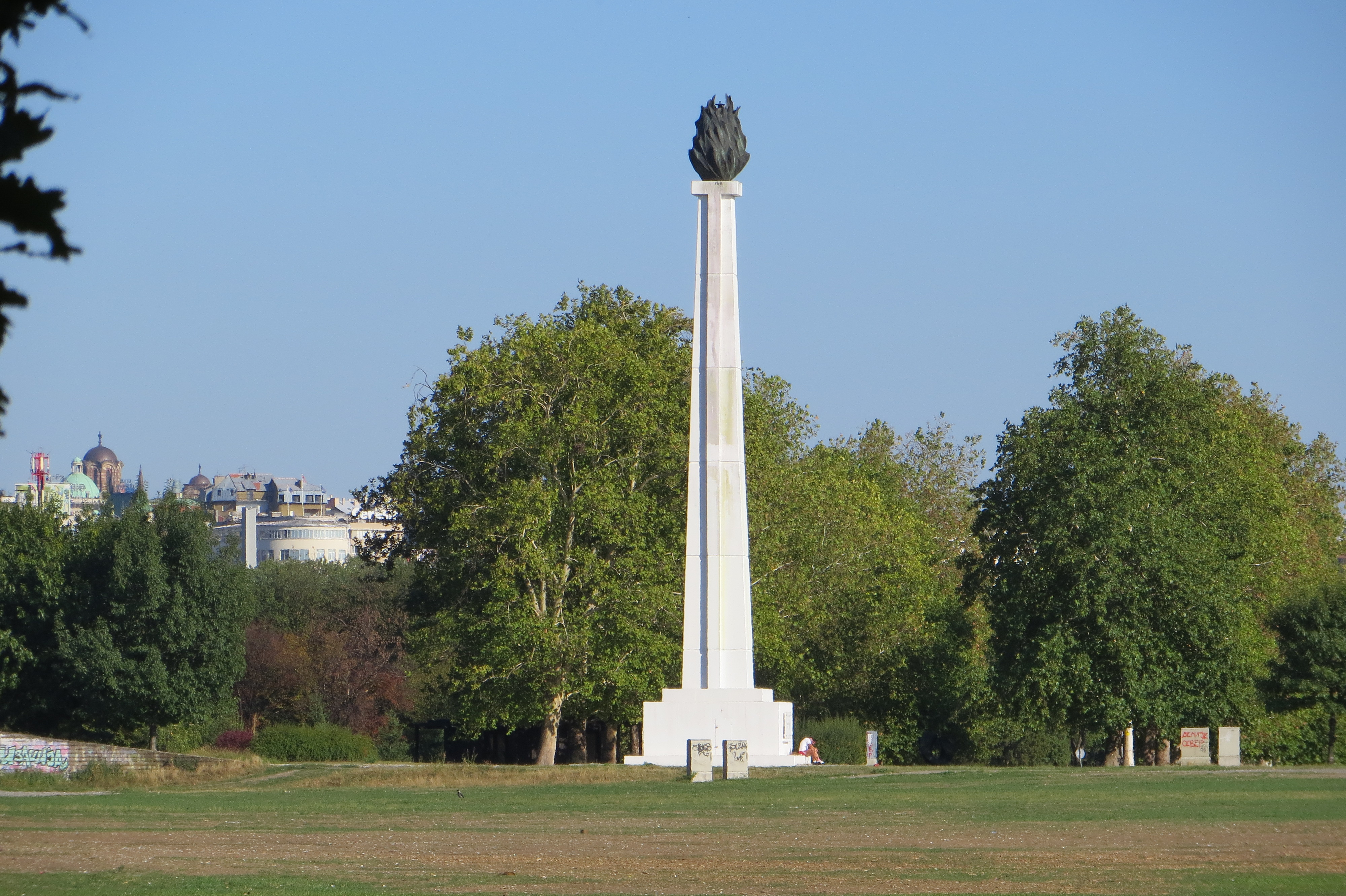 Park prijateljstva